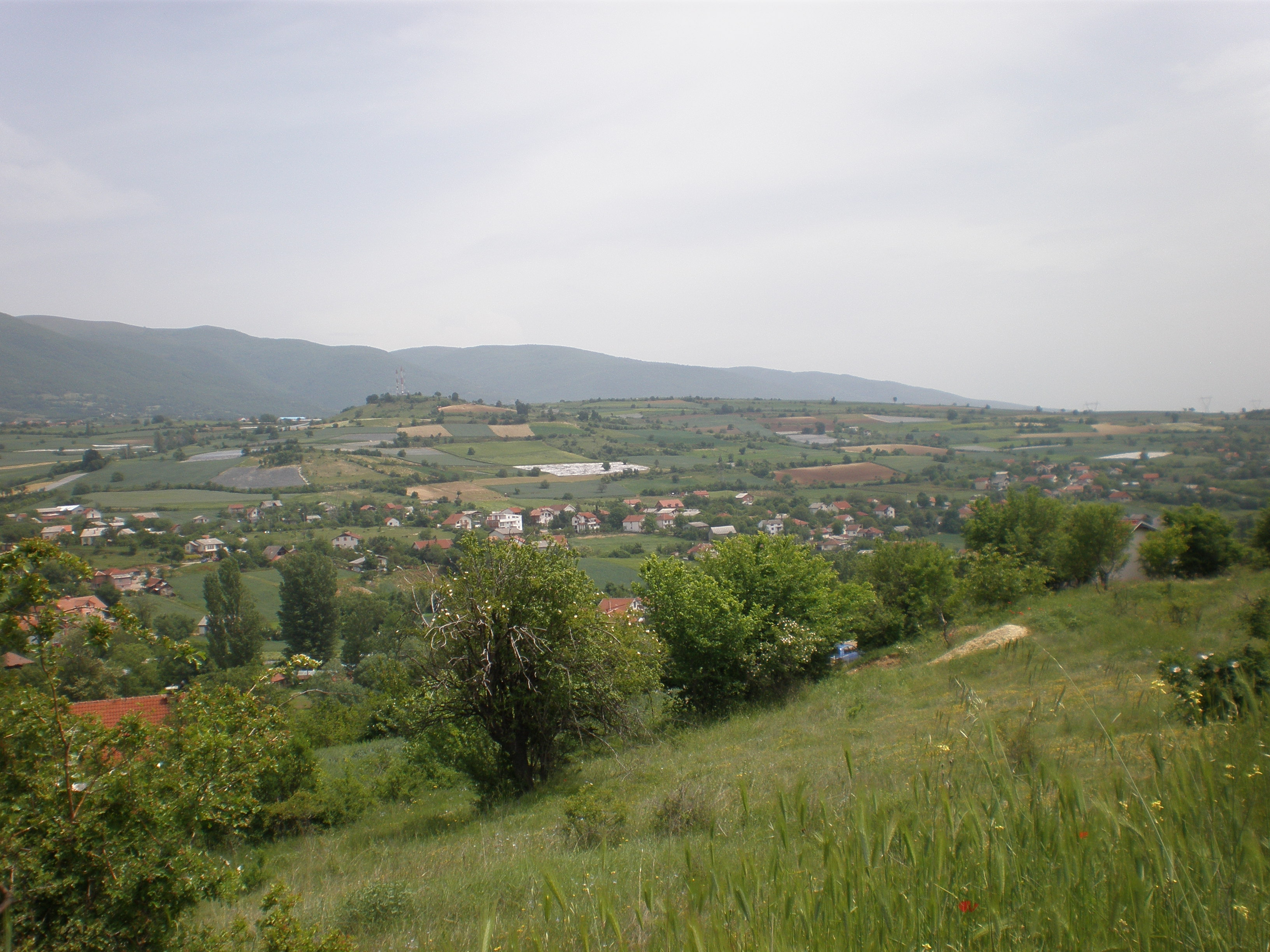 Поглед на дял от Радишани от запад.